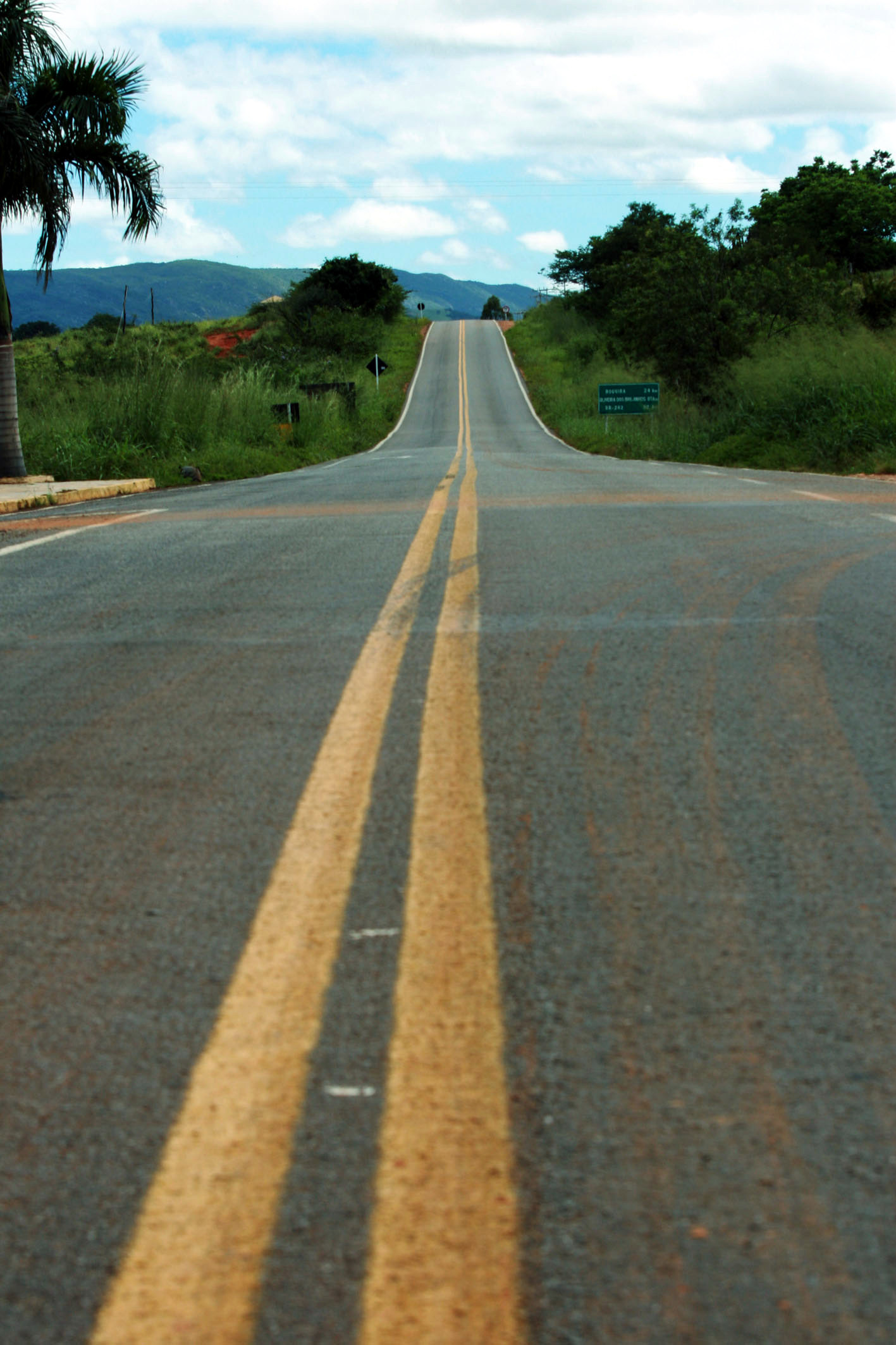 Plenária do Plano Plurianual Participativo em MacaúbasNa foto: Autora: Carol Garcia / AGECOM